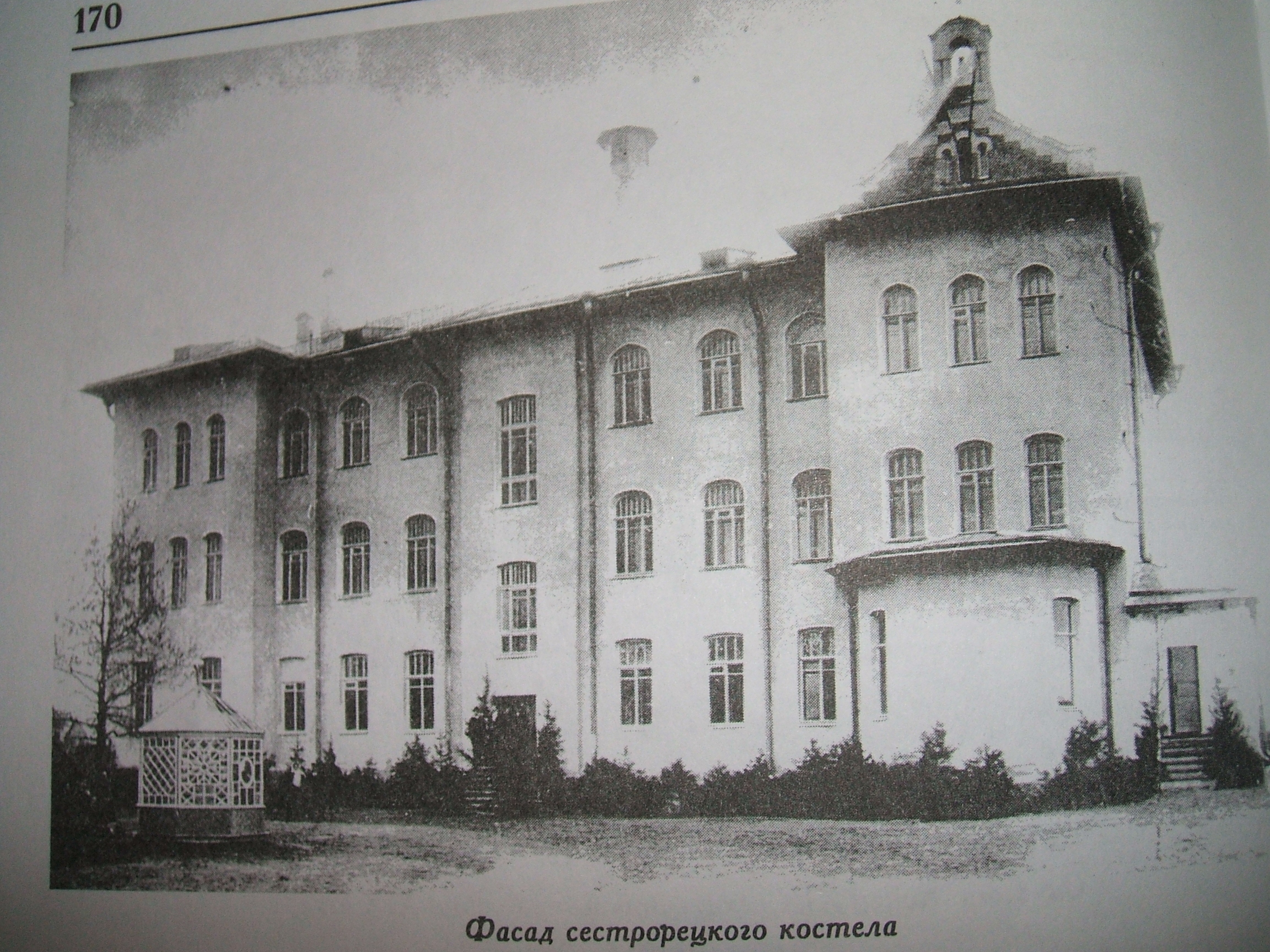 Володарского 26 Сестрорецка в 1910г.